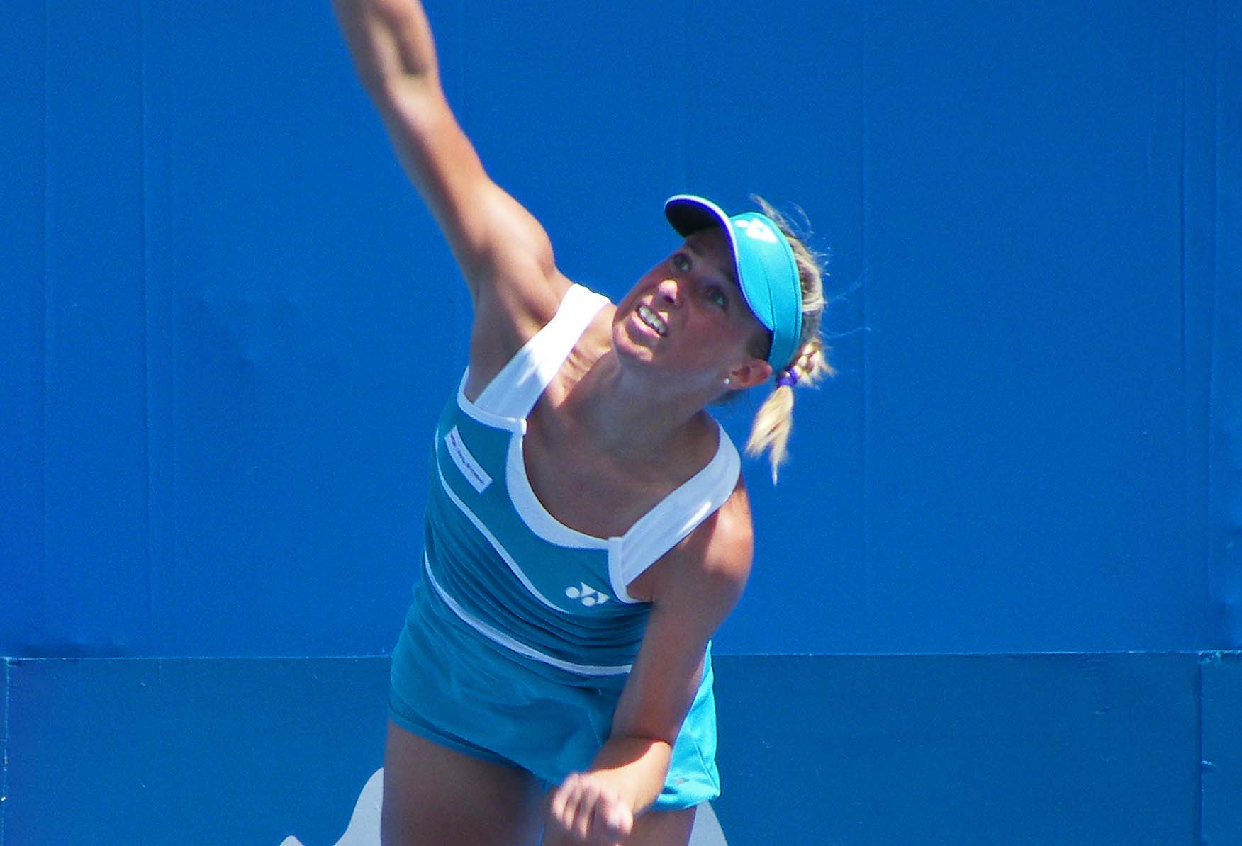 Andrea Hlaváčková, 2011.